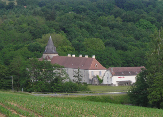 L'abbaye de Sauvelade dans la vallée du Laà , aujourd'hui étape de Compostelle sur la voie du Puy.